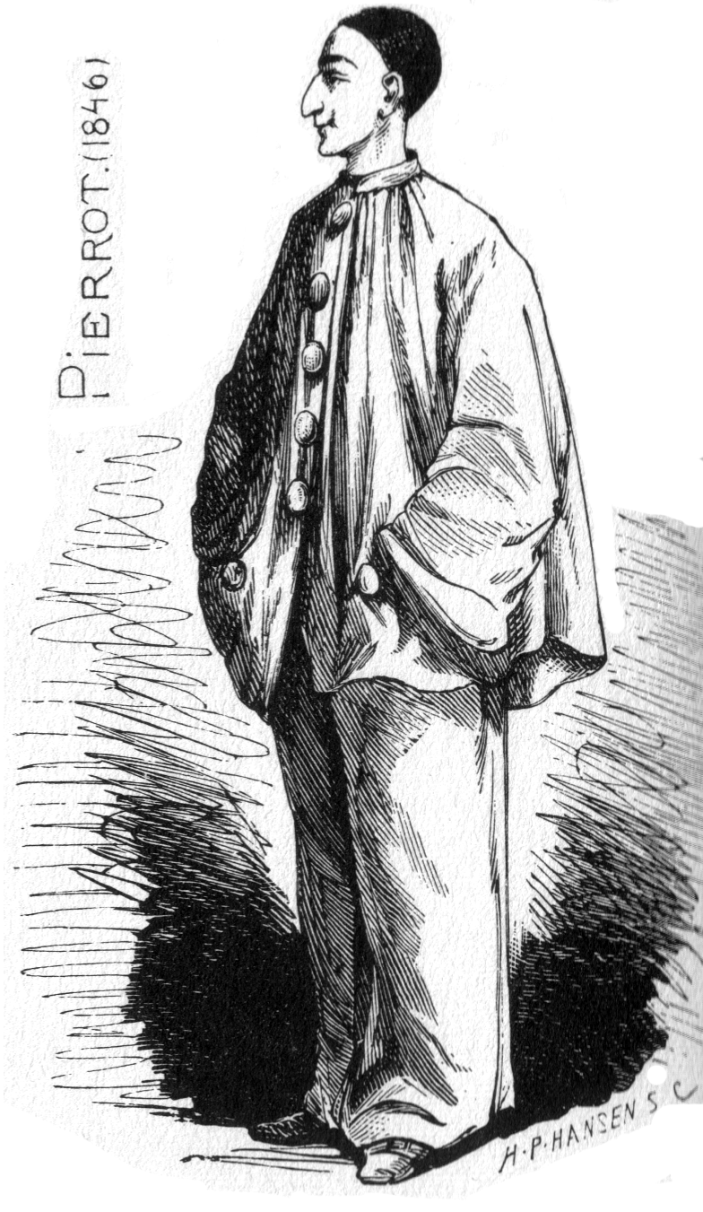 Pjerrot omkring 1846